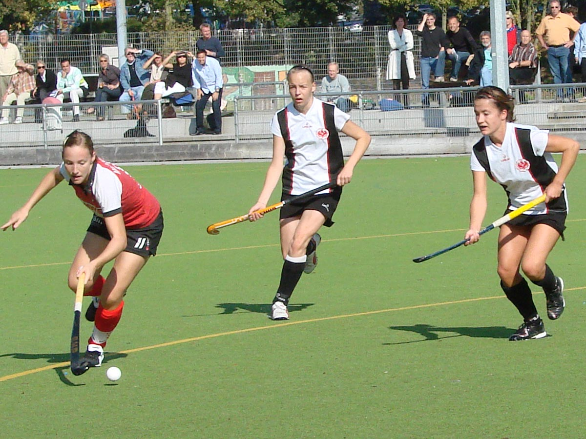 Feldhockey 2.Bundesliga Spielszene TSV Mannheim - Eintracht Frankfurt. Carmen Malacarne am Ball.